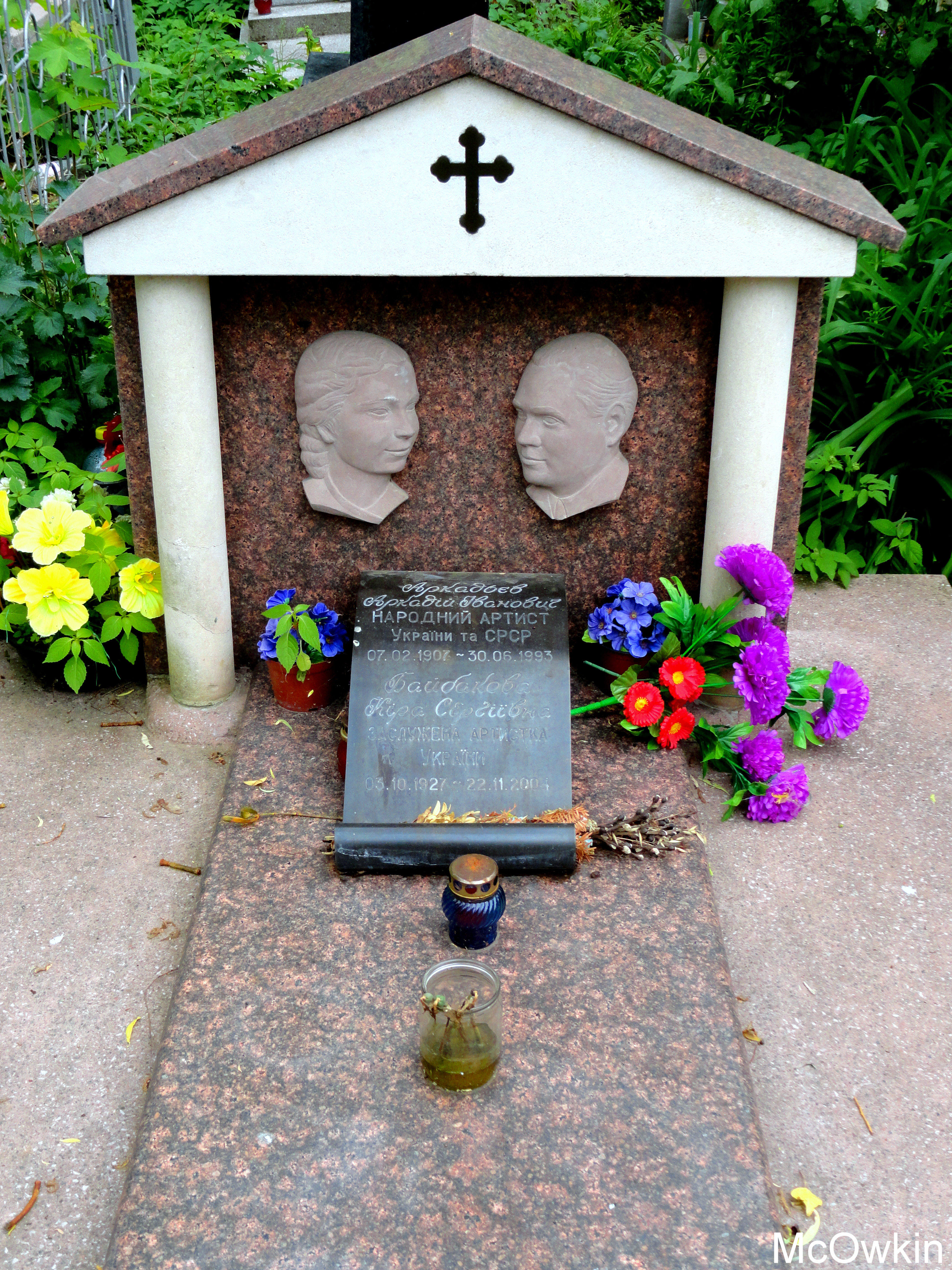 Могила Аркадия Ивановича Арка́дьева (1907—1993) — советского украинского актёра, театрального режиссёра Народного артиста СССР (1977). Лауреата Сталинской премии третьей степени (1952) и Киры Сергеевны Байбаковой, заслуженной артистки Украины (1927—2004).